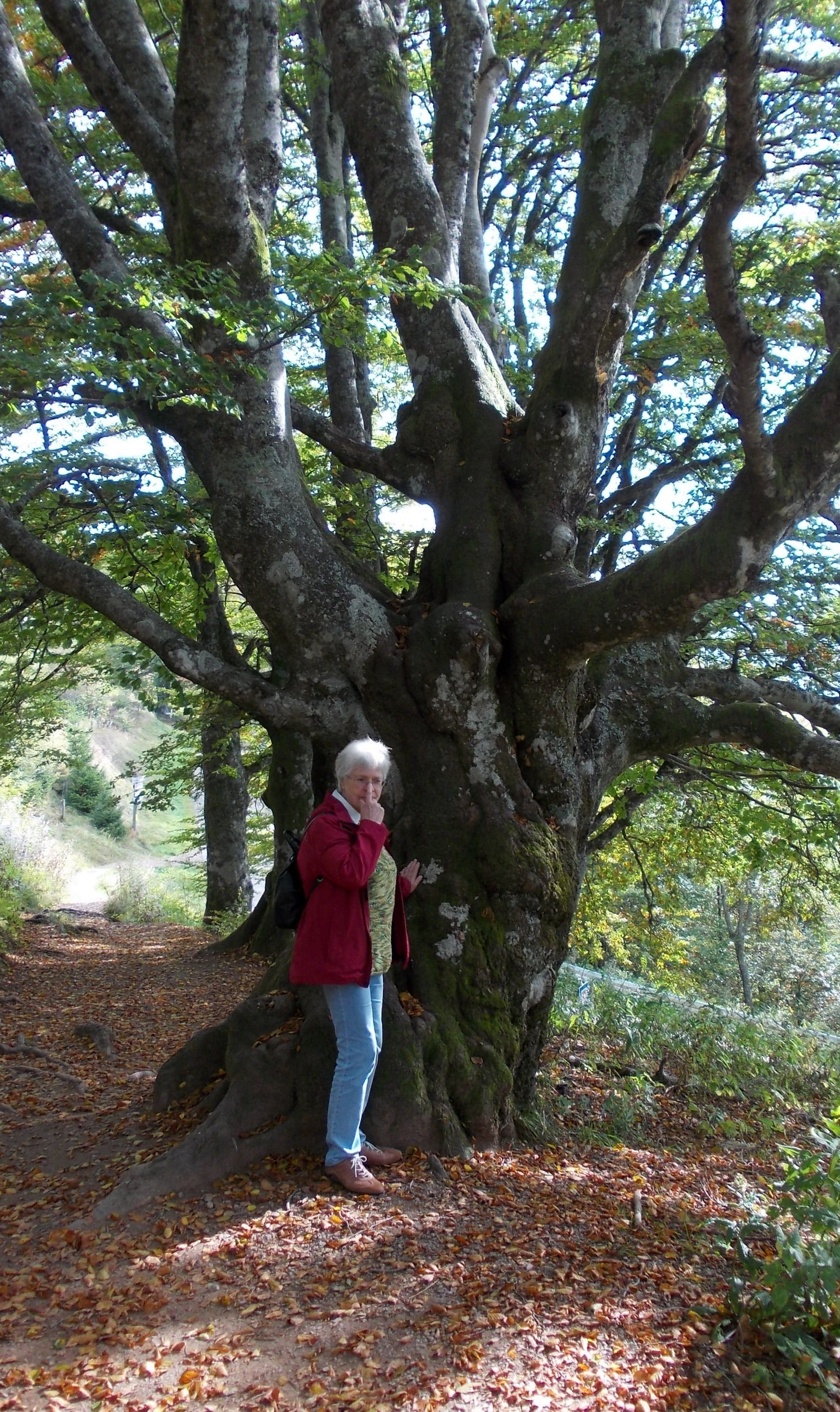 Freiburg i. Br. - Weidbuche am Schauinsland